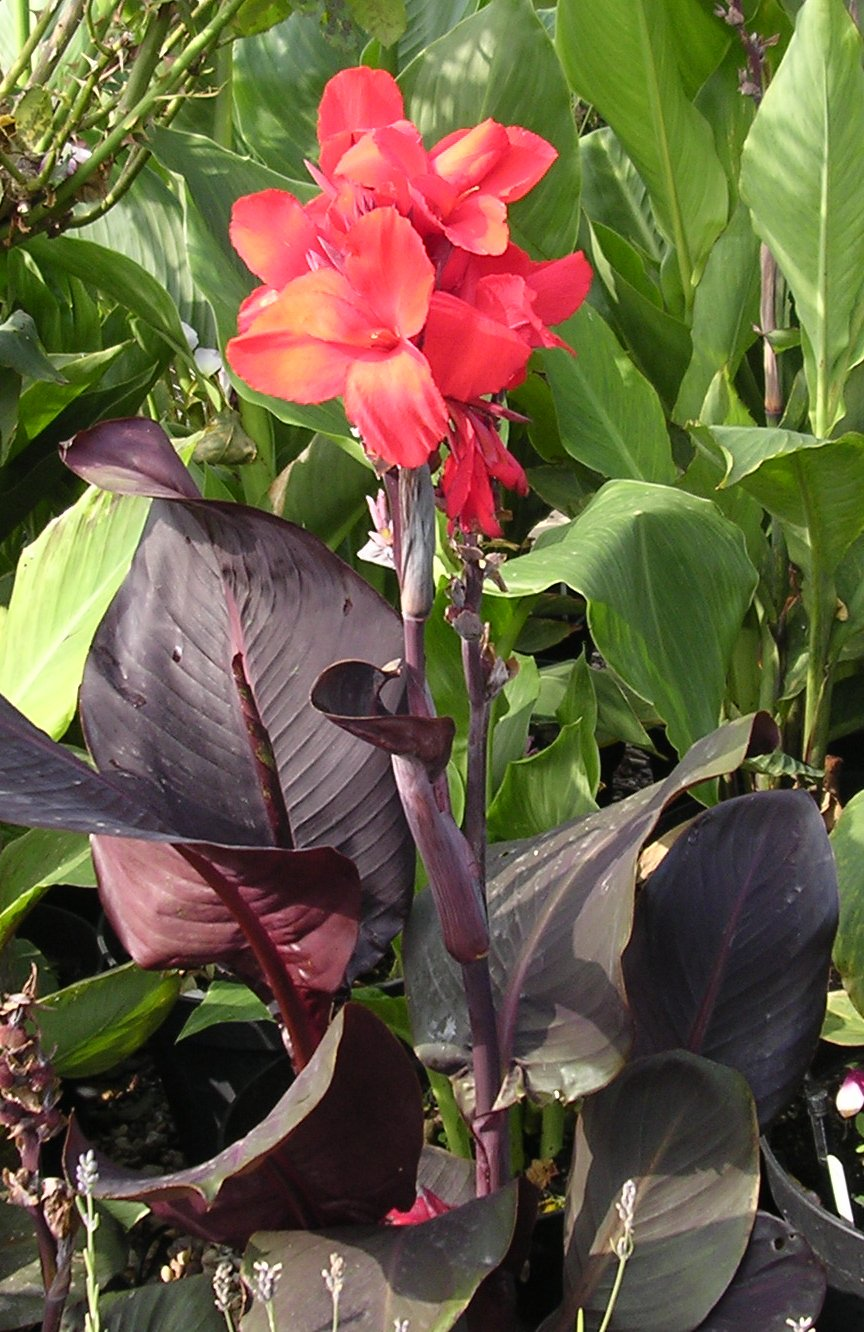 Canna (Crozy Group) 'Jessie Dalebö', Dalebö 2003